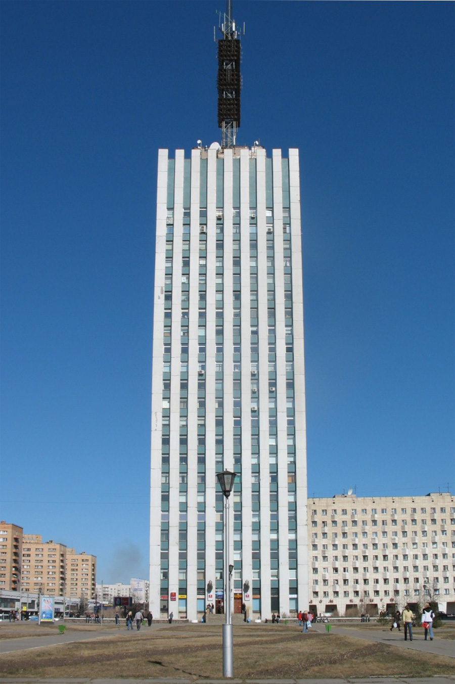 High-rise building. Arkhangelsk. Russia.